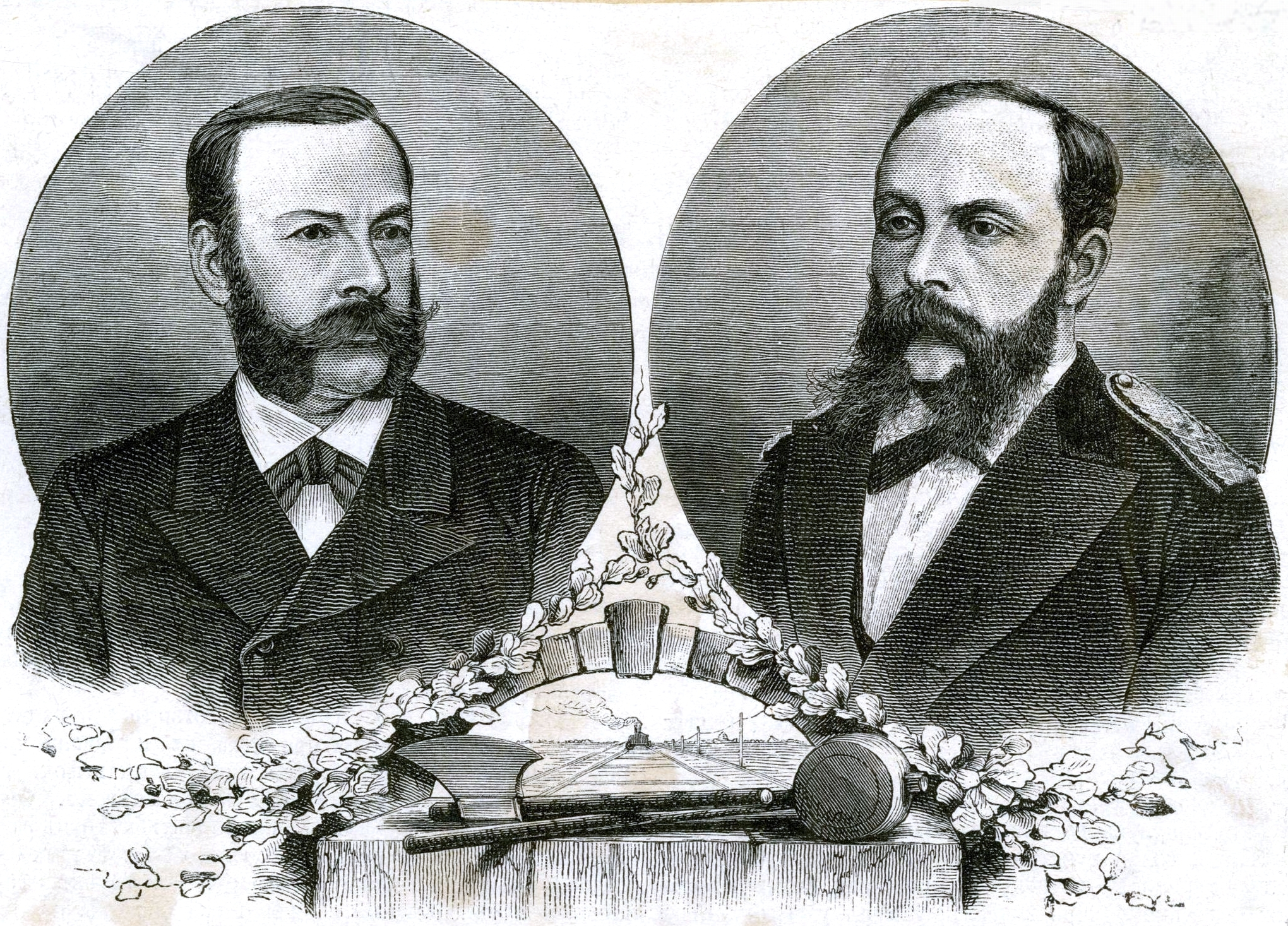 Строители Александровского моста В.И. Березин и Н.А. Белелюбский. Эстамп. Начало 1880-х. Гравюра на дереве